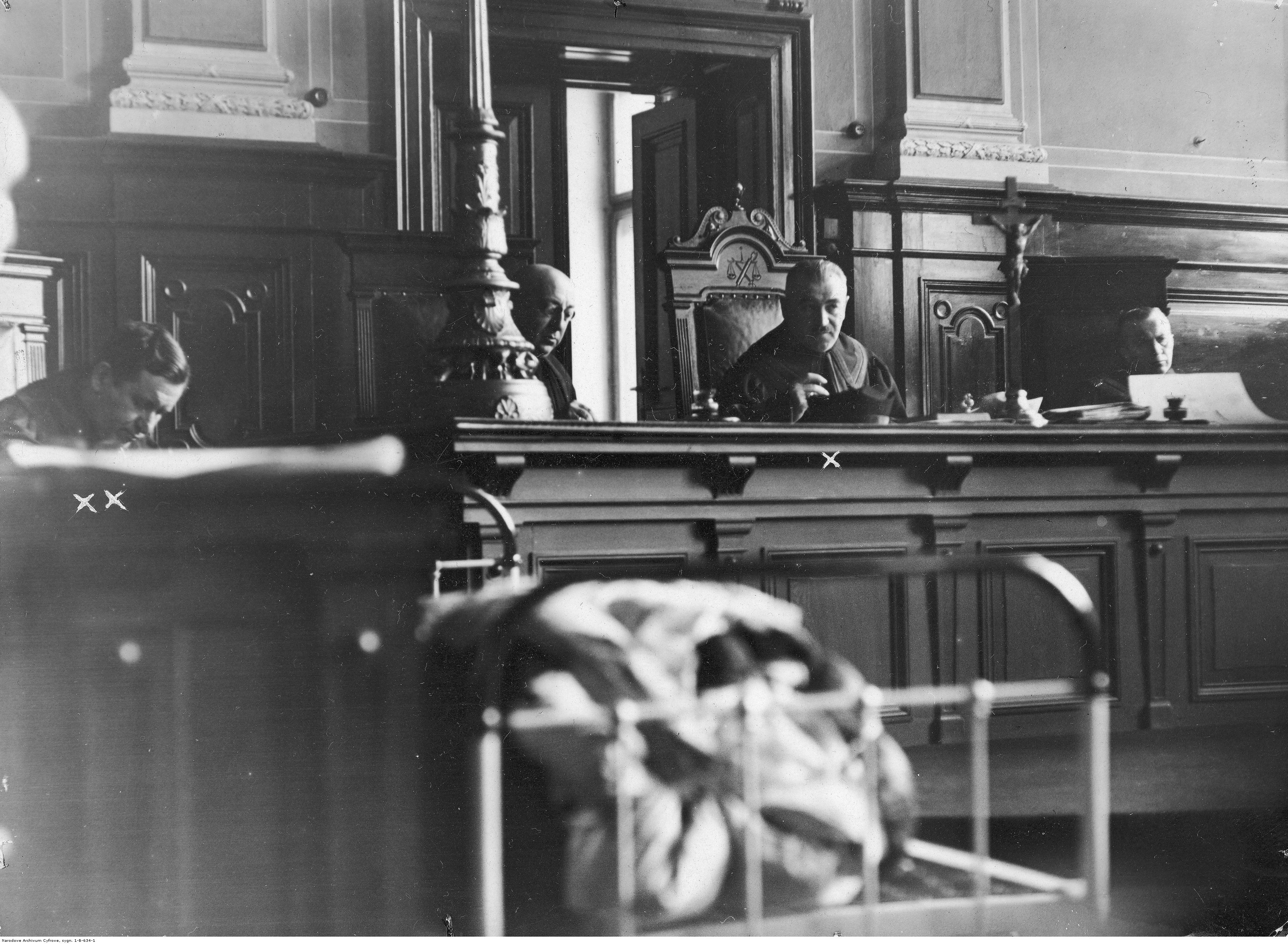 Proces Rity Gorgon w 1932. Prokurator Alfred Laniewski (1), sędzia Jan Antoniewicz (3)